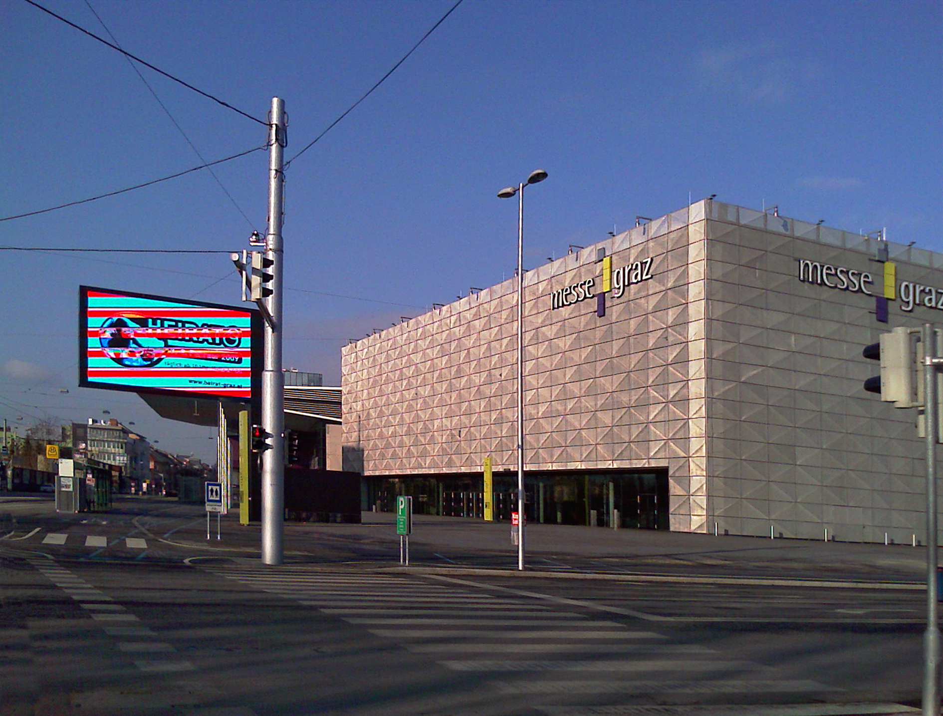 Die neue Grazer Messehalle, neben der Stadthalle